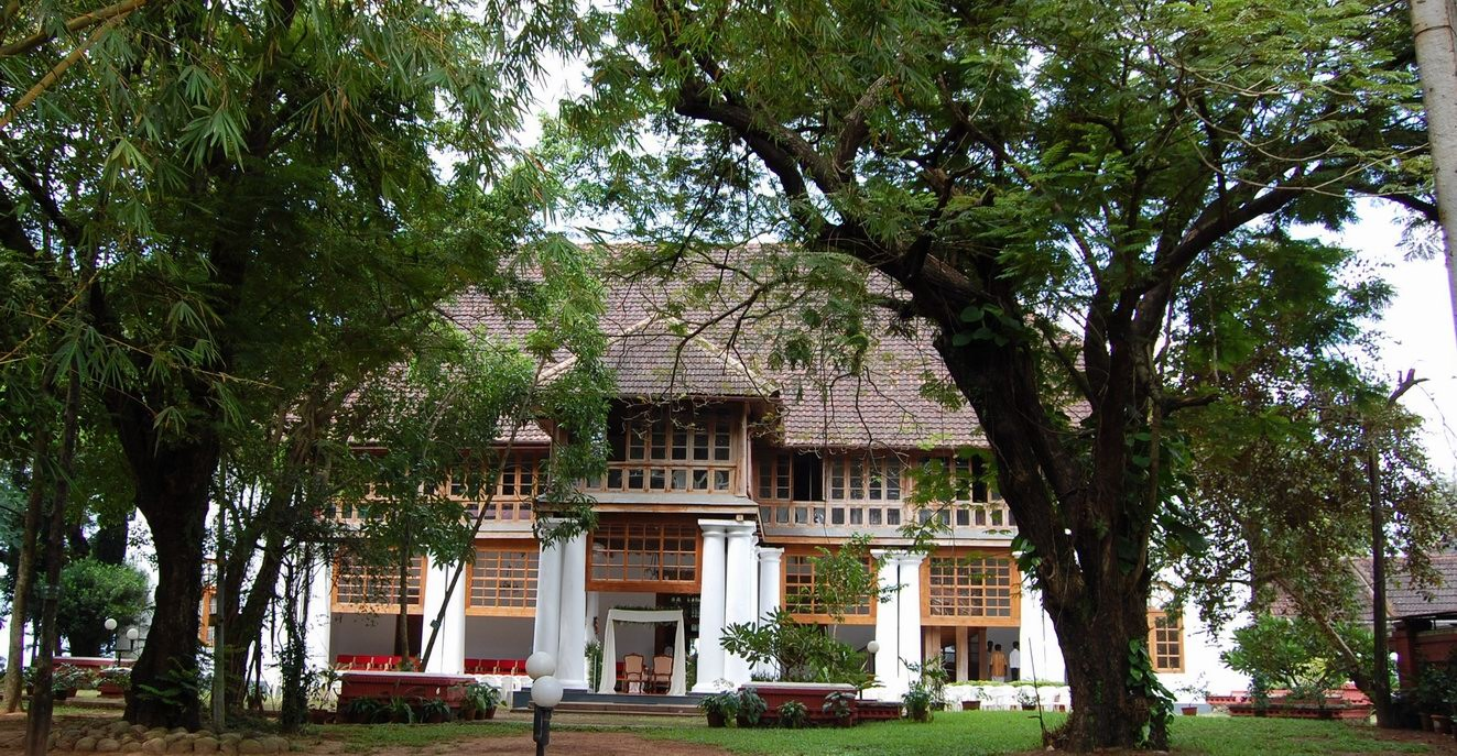 ബോൾഗാട്ടി